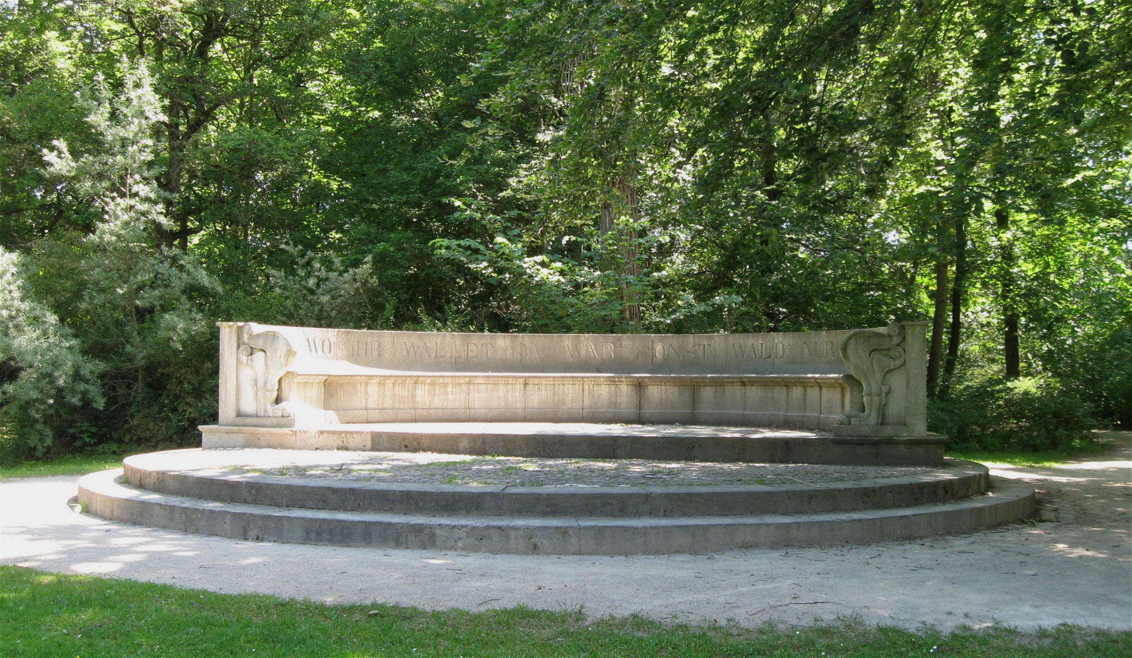 Steinerne Bank im Englischen Garten in München, die Aufschrift lautet:„Hier wo ihr wallet da war sonst Wald nur und Sumpf“, Entwurf von Leo von Klenze, 1838